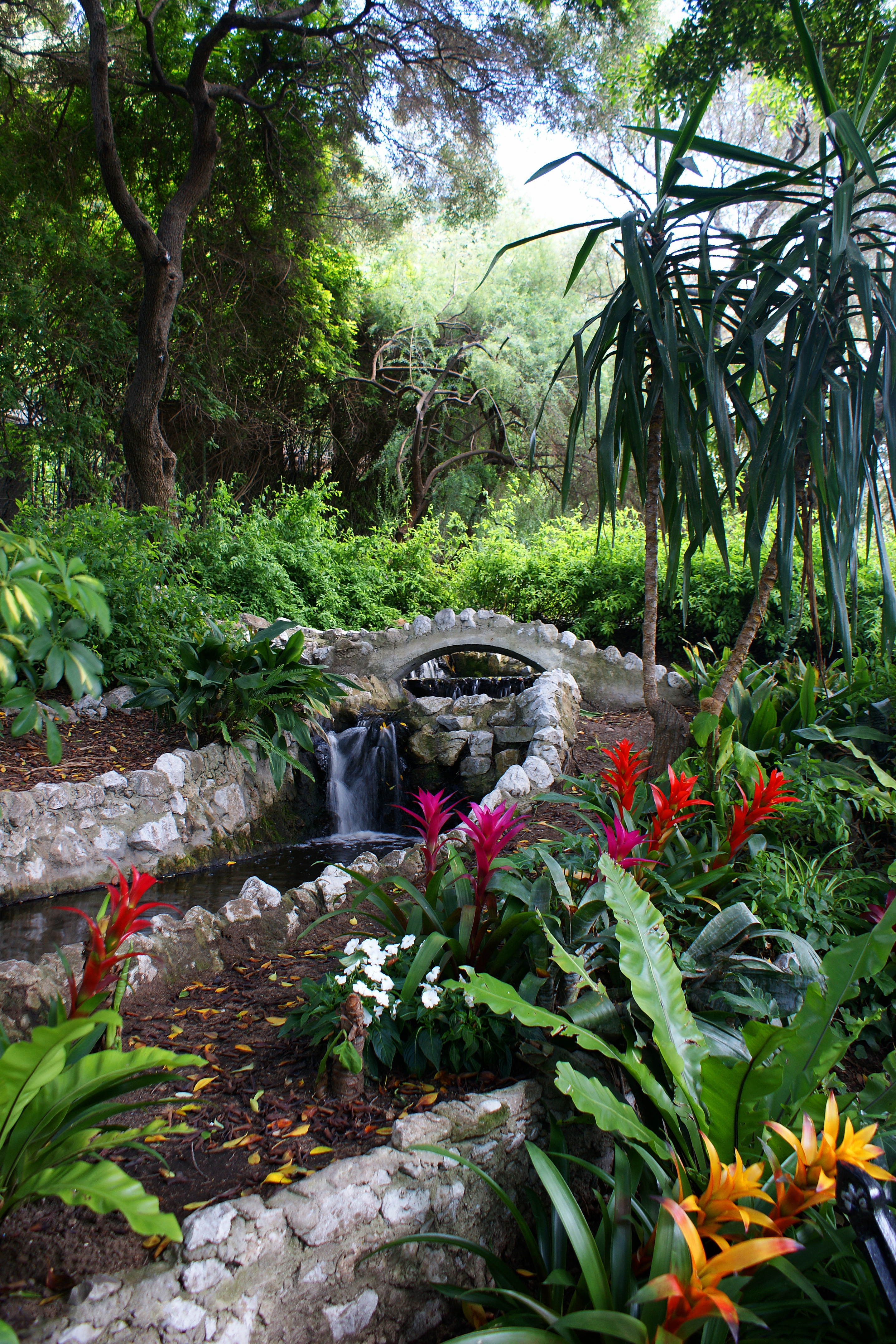 Gibraltar gardens